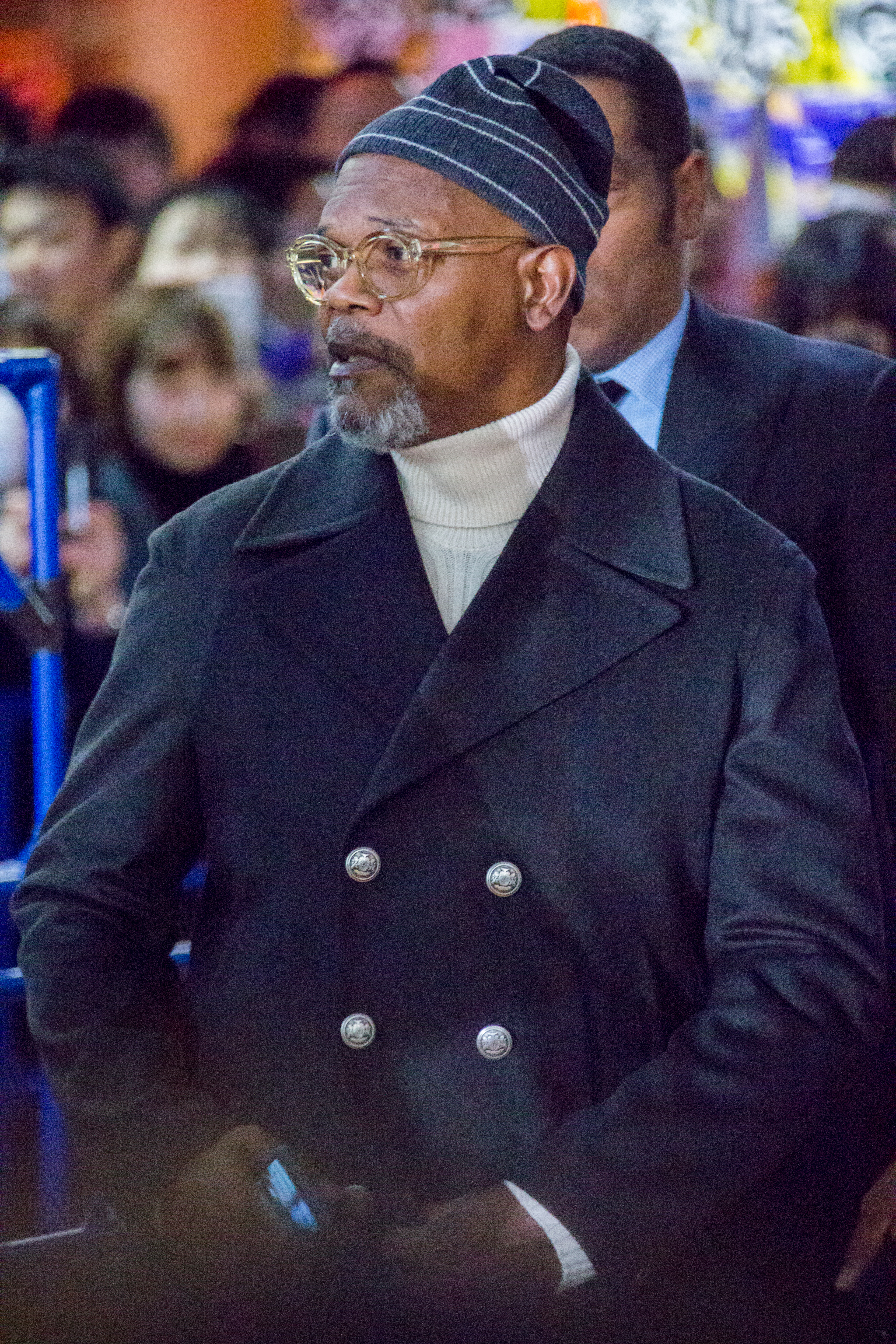 キングコング: 髑髏島の巨神 ジャパンプレミア レッドカーペット サミュエル・L・ジャクソン